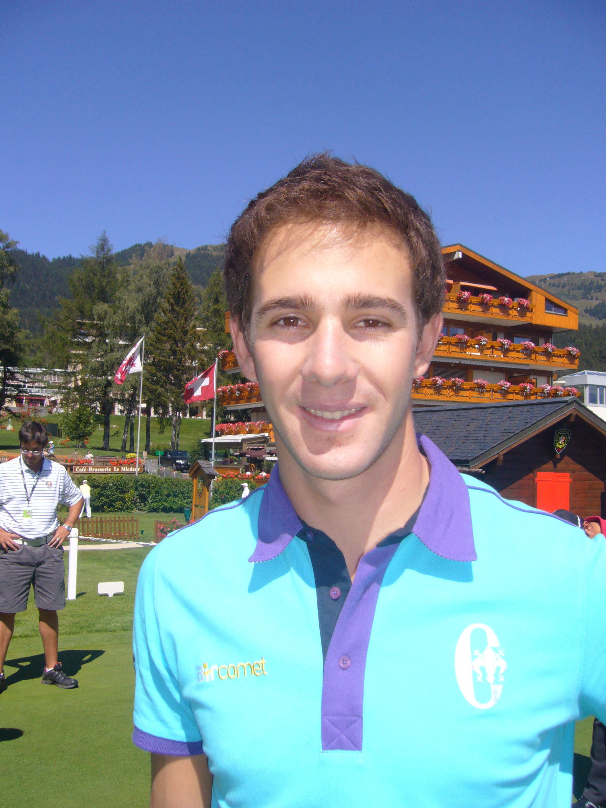 Tano Goya, Argentinian golfer